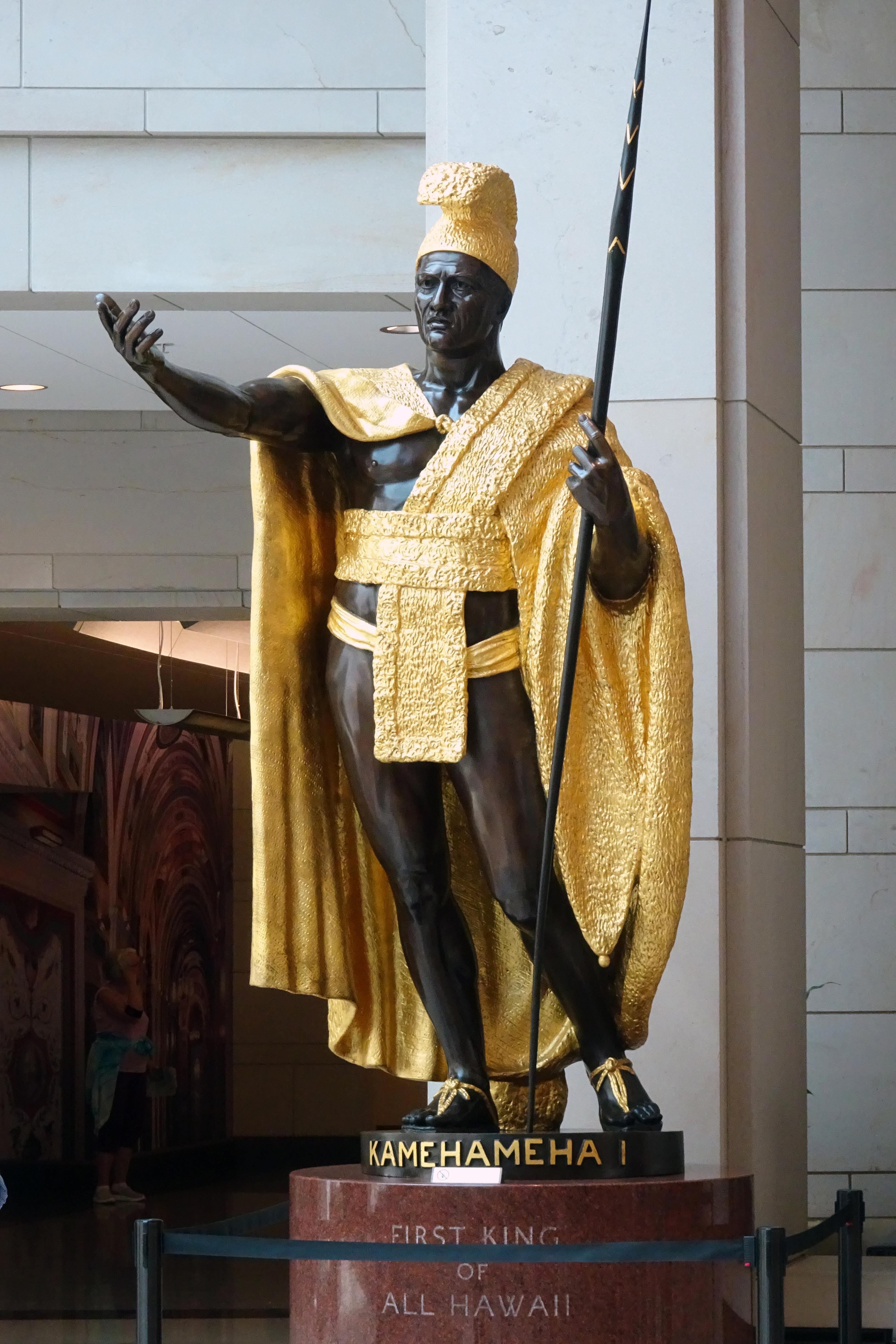 Statue de Kamehameha Ier, premier roi d'Hawaï, dans le hall du Capitole des États-Unis